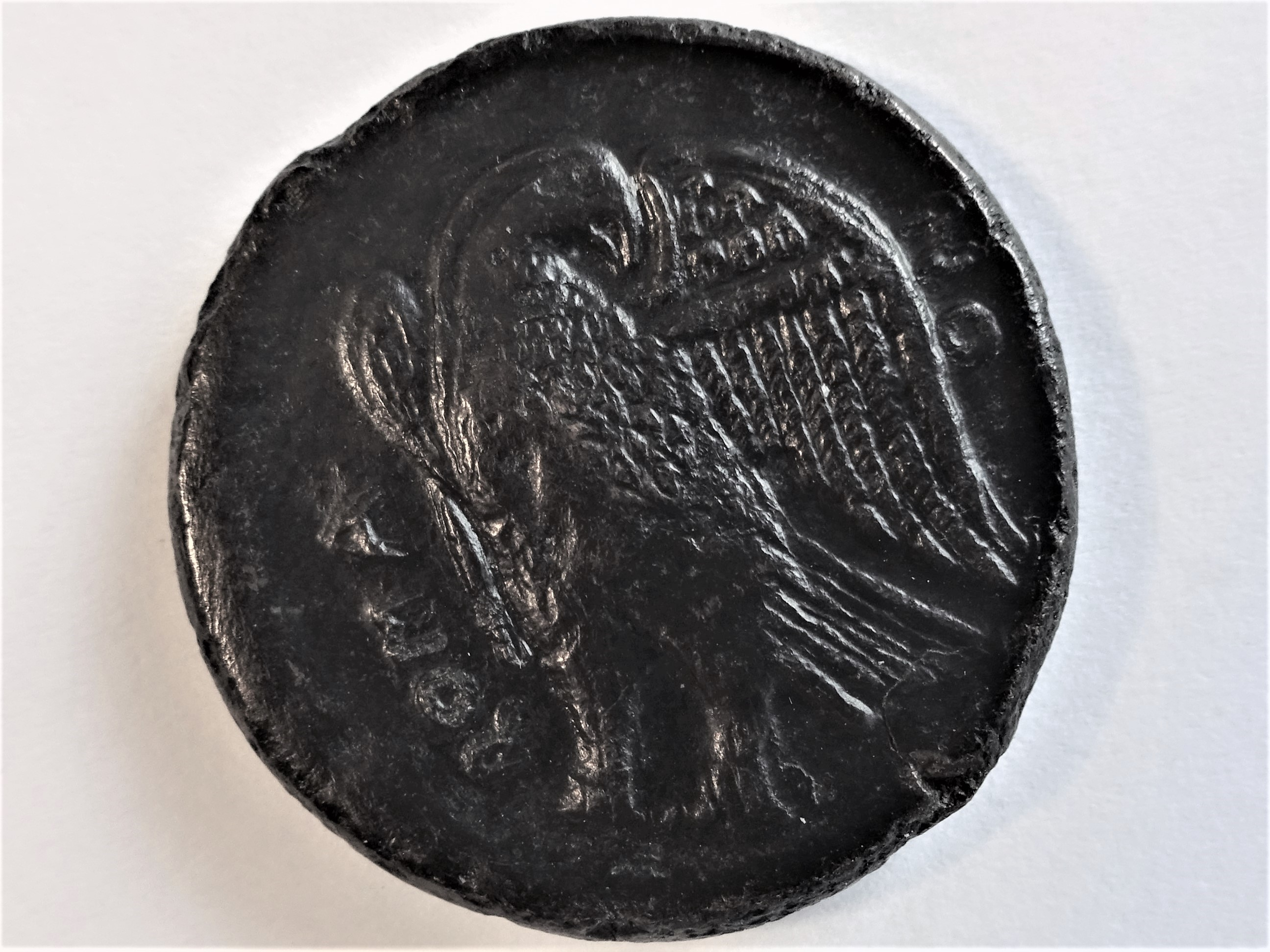 Rückseite der Bronzemünze für Messana, Adler auf Blitz, ROMANO